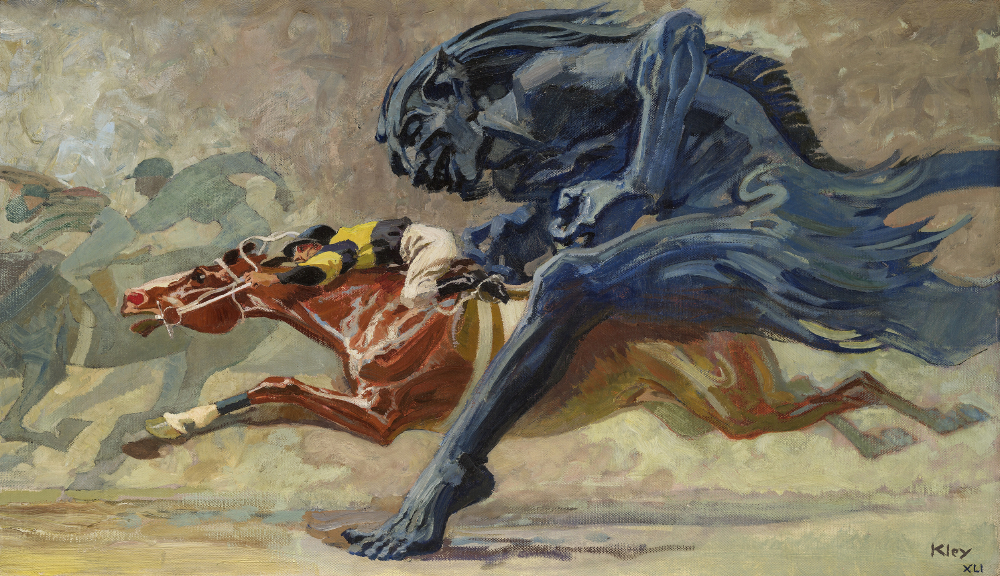 Heinrich Kley: Wettrennen. Öl auf Leinwand, 48 x 85 cm, rechts unten signiert und datiert.